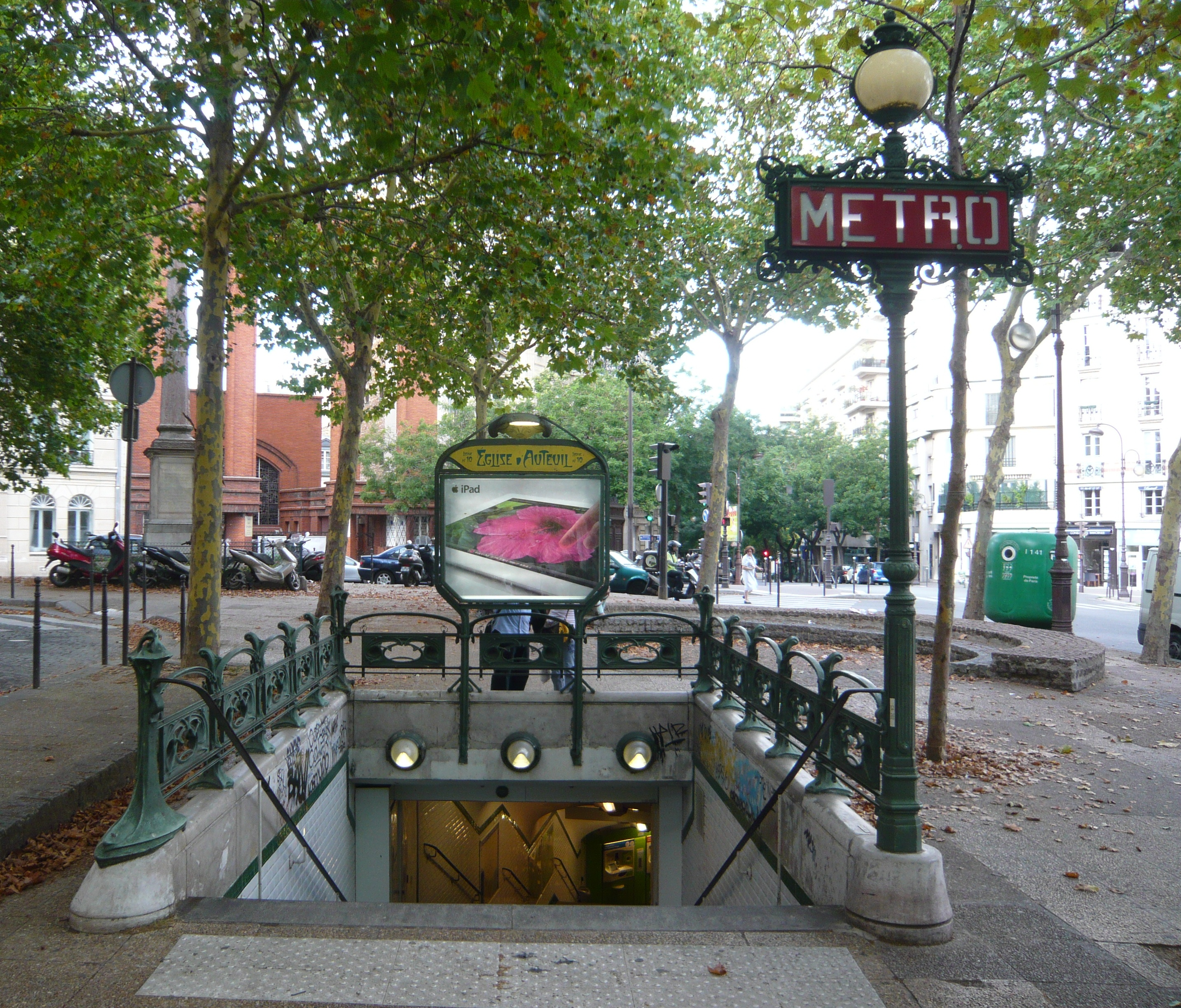 Edicule Guimard de la Station Eglise d'Auteuil